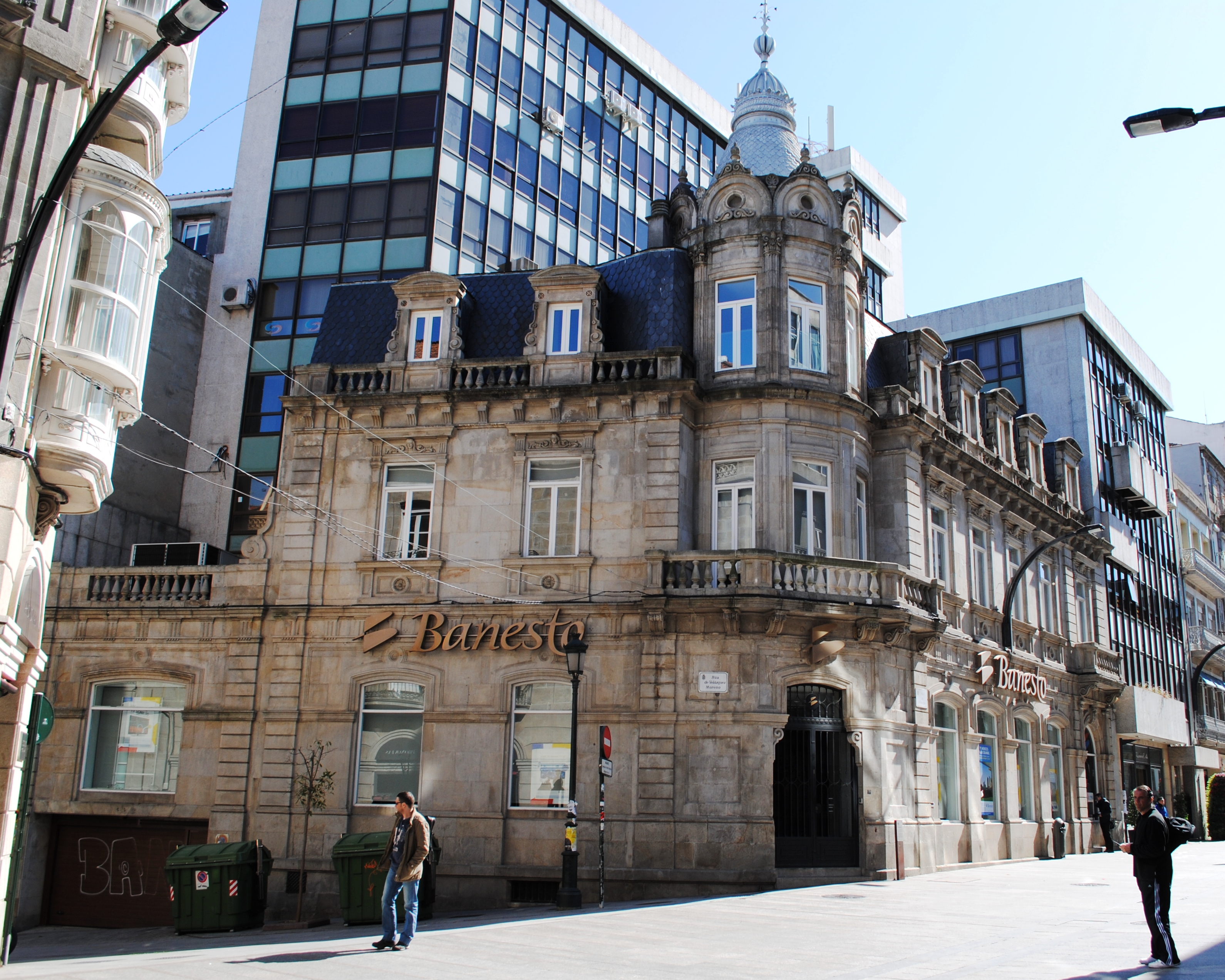 Casa de Estanislao Durán, Manuel Felipe Quintana